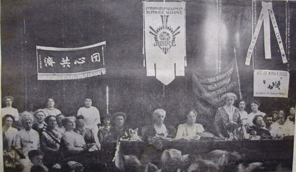 Světový kongres pro volební právo žen v Budapešti, 1913